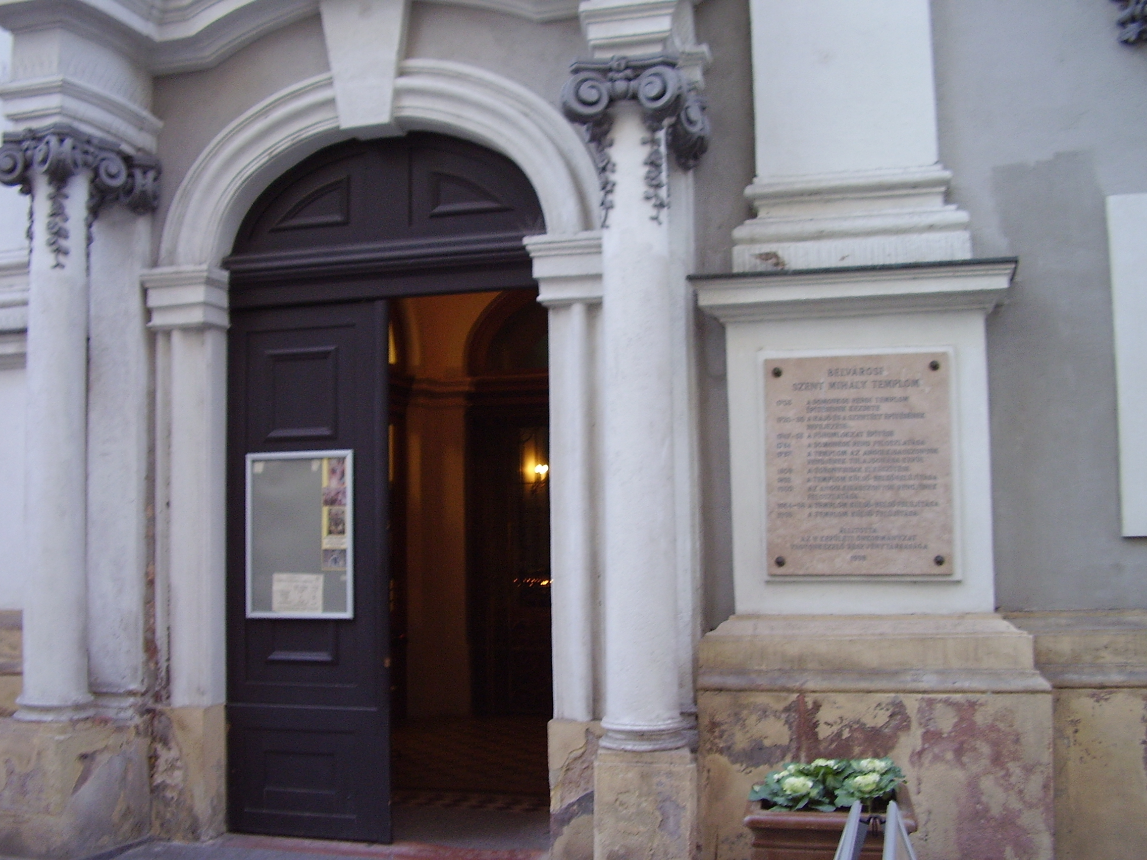 Church in Budapest